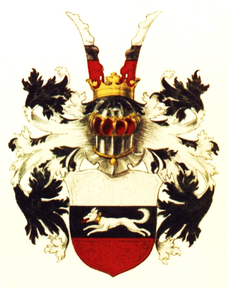 Wappen des Thüringer Adelsgeschlechts von Berga († 1805 im Mannesstamm).